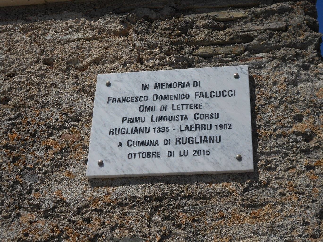 Targa dedicata al linguista Francesco Domenico Falcucci a Rogliano (Corsica)